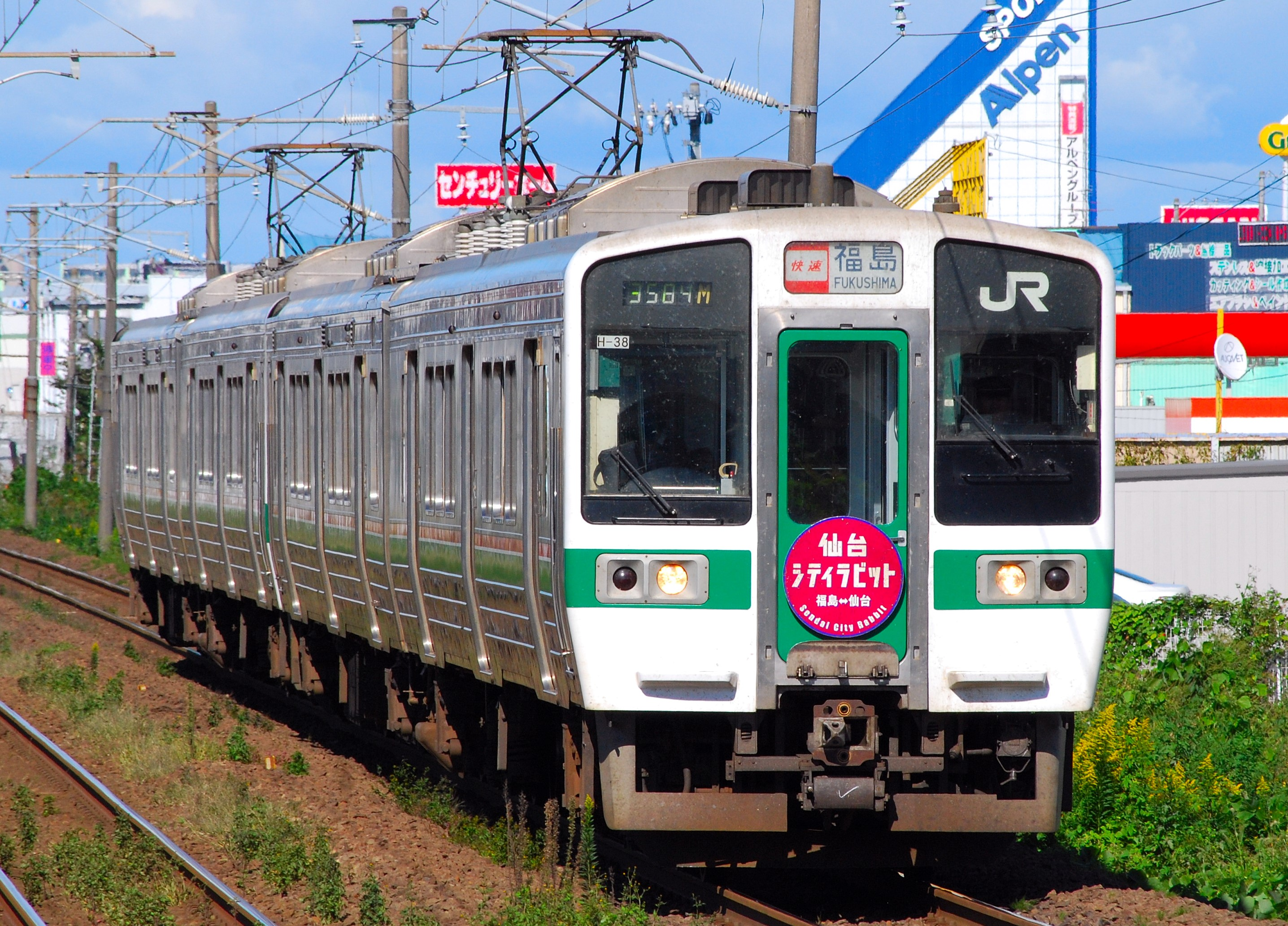 719系仙台シティラビット（館腰駅で撮影）